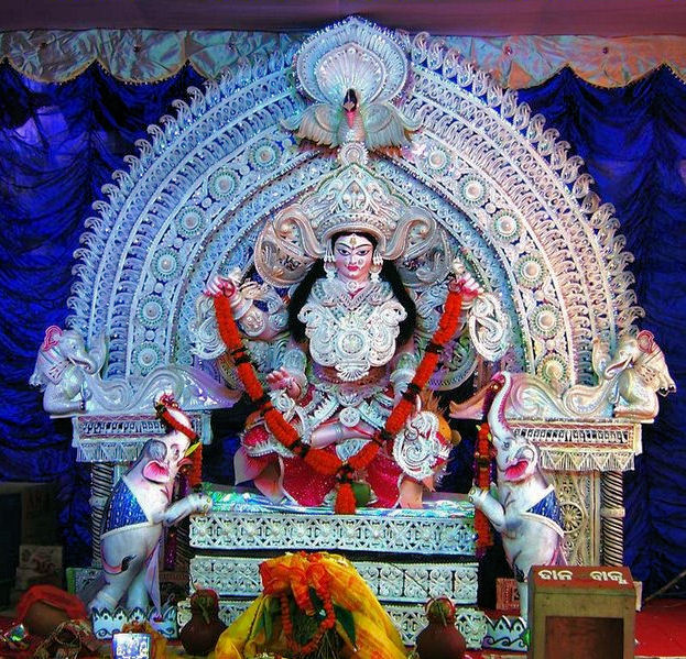 Gaja Laxmi (Godess Laxmi on Elephant)